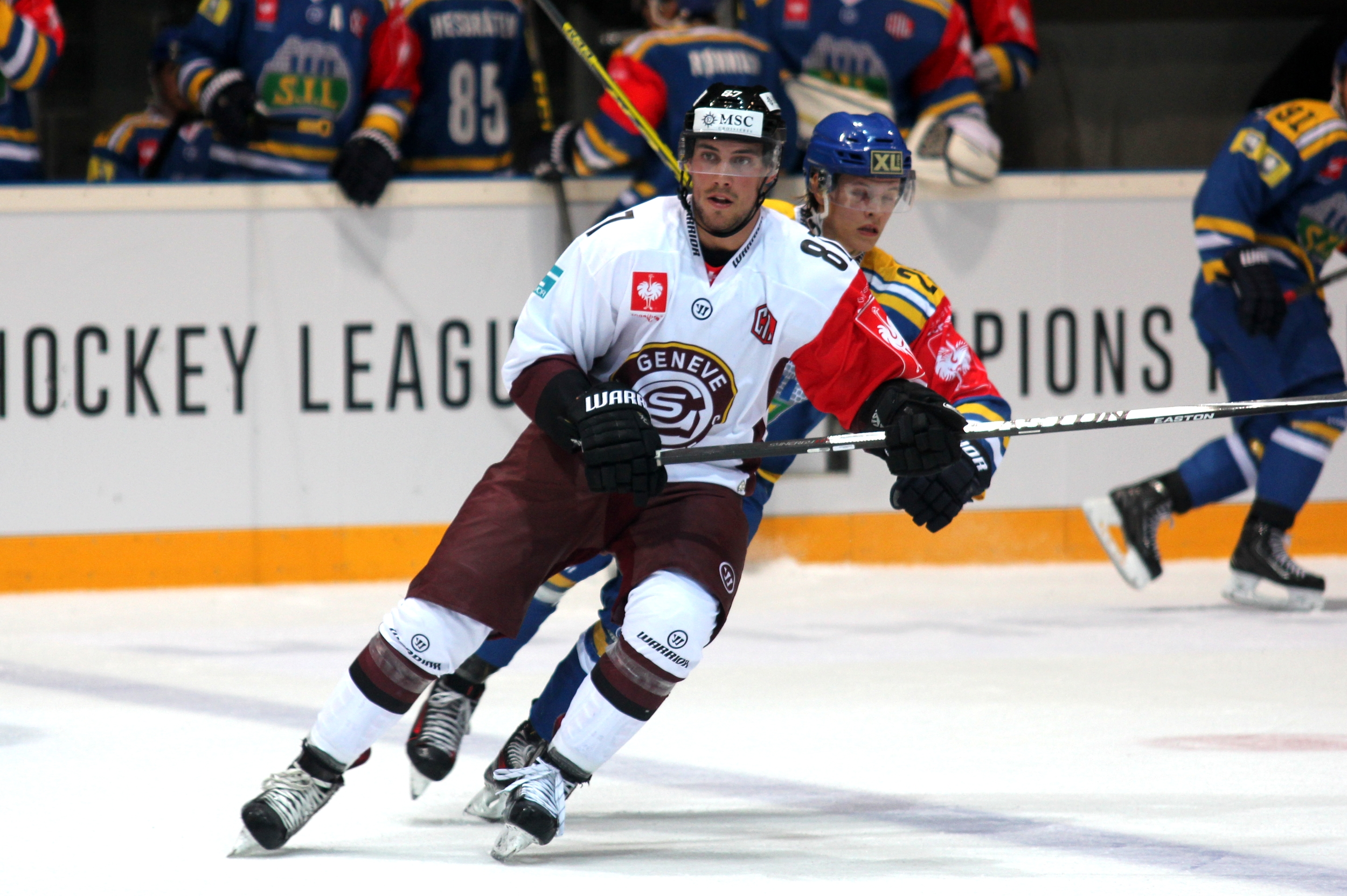 Marco Pedretti (G 87), Martin Gran (H 29).